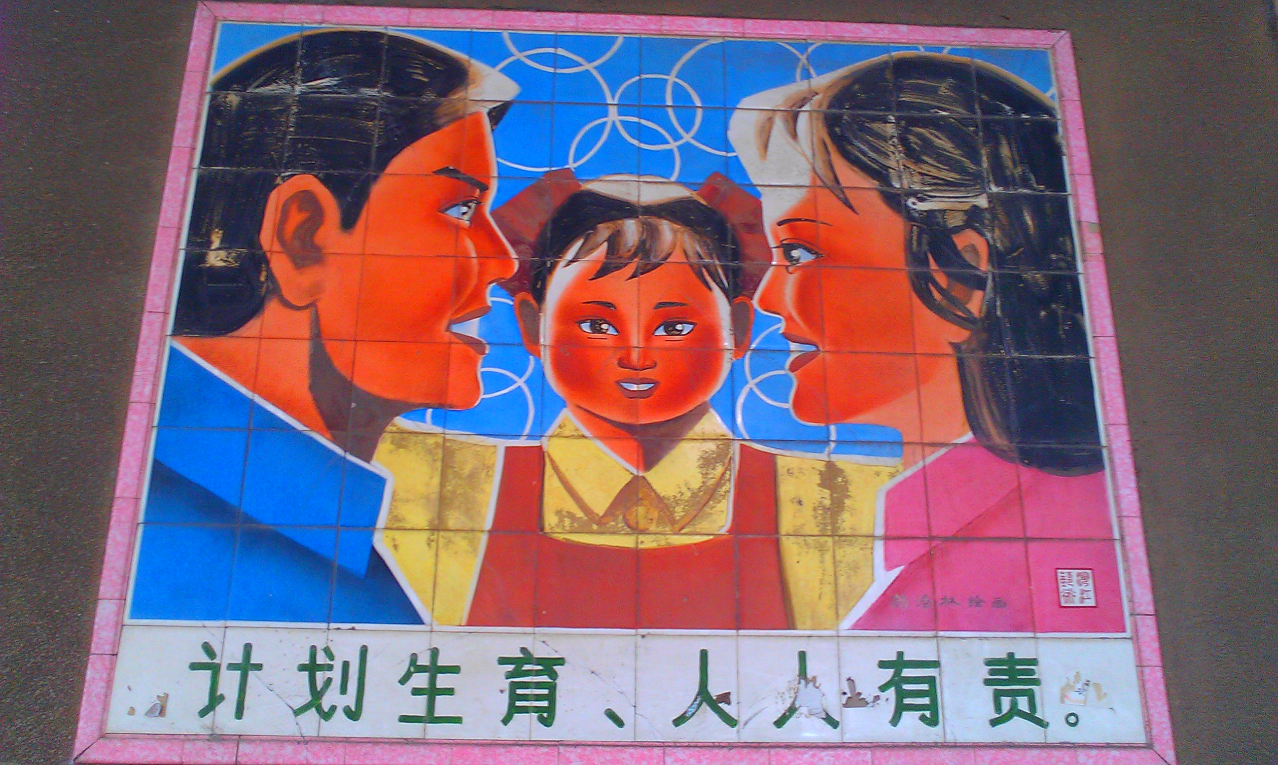 中文（香港）: 新會區會城鎮拍攝的計劃生育瓷畫